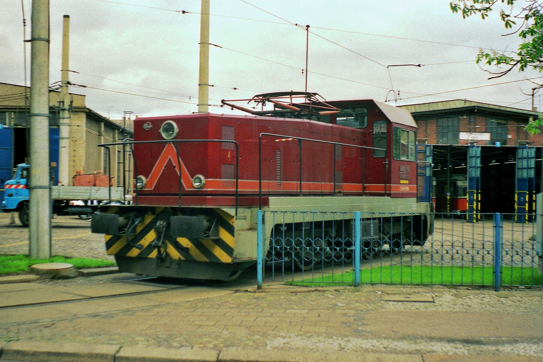 Lokomotive LEM 25-002 der BEHALA auf dem Betriebshof Nalepastraße der BVG 03.Mai.1992